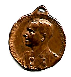 Colonie permanenti Umberto II di Savoia - Pro erigendo padiglione elio-chirurgico in Pietra Ligure